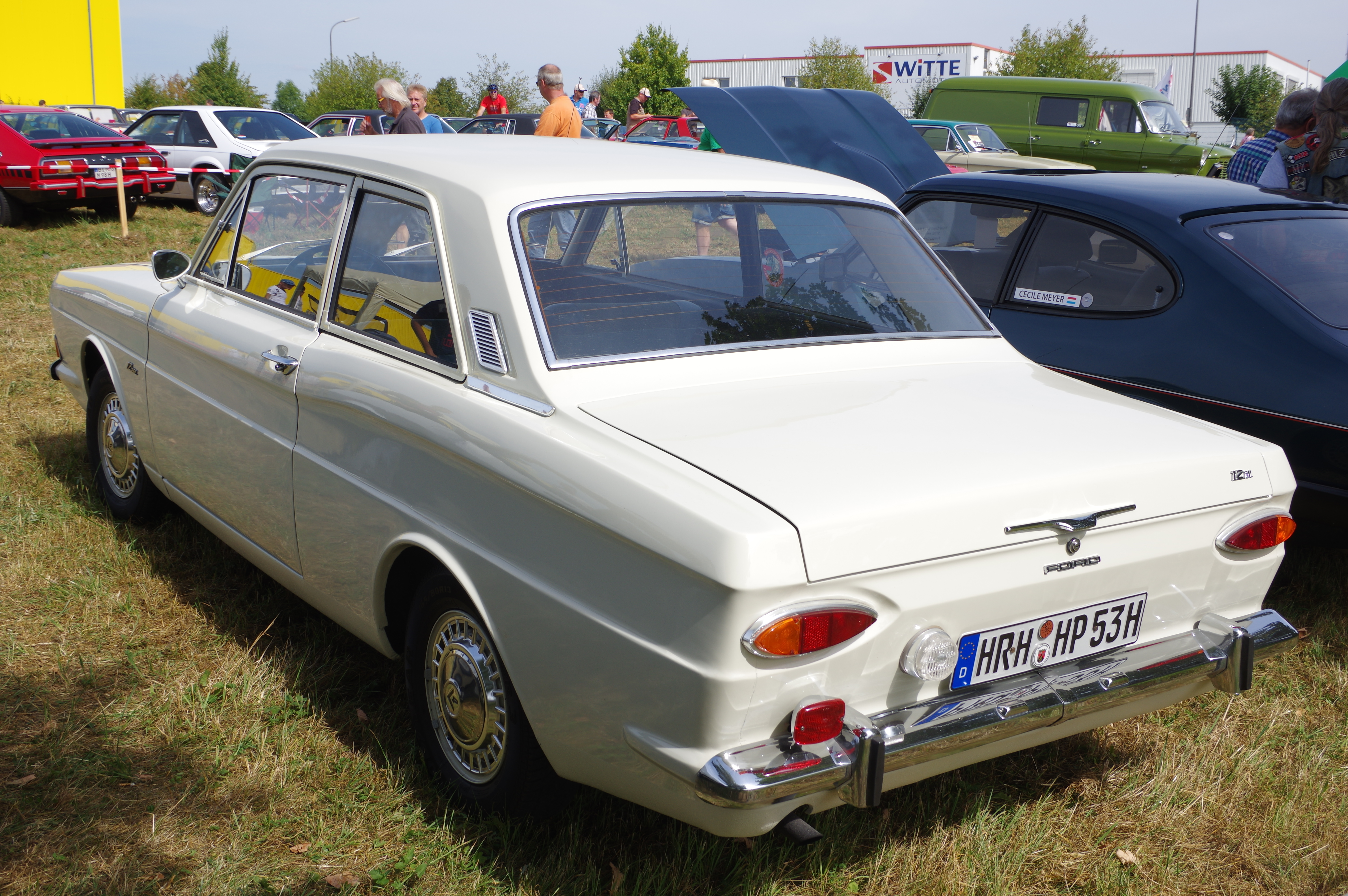 Ford Taunus P6 12m, 1968, 1288 cm³, V4, 50 PS , Bitburg Classic 2016, Das Nummernschild ist verfälscht!